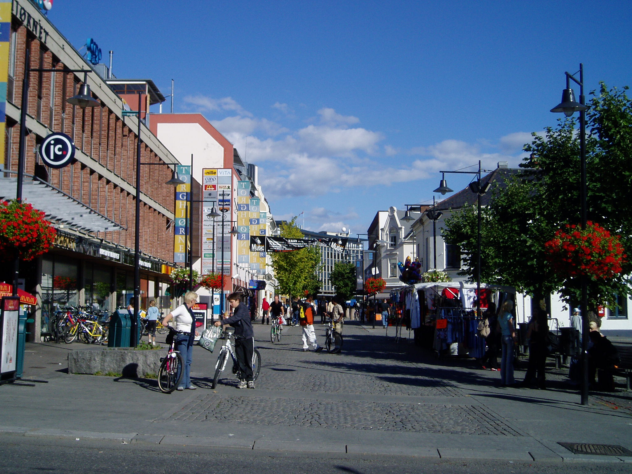 Torggata, Hamar, Norway.